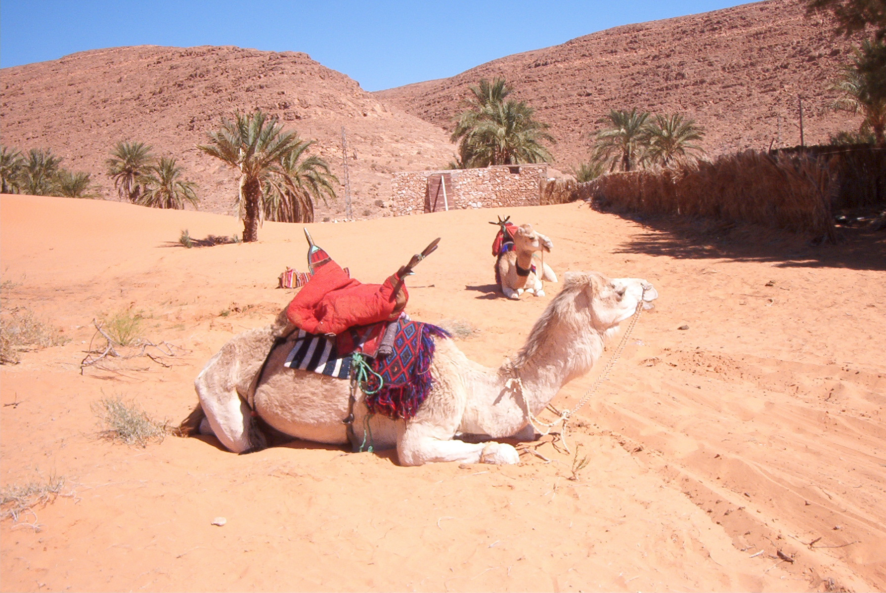 Meharis à Seb Seb Ghardaïa (Algérie)